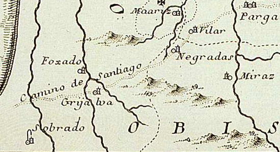 Camiño de Santiago por Grixalba (Sobrado, Galiza) no mapa do bispado de Mondoñedo.